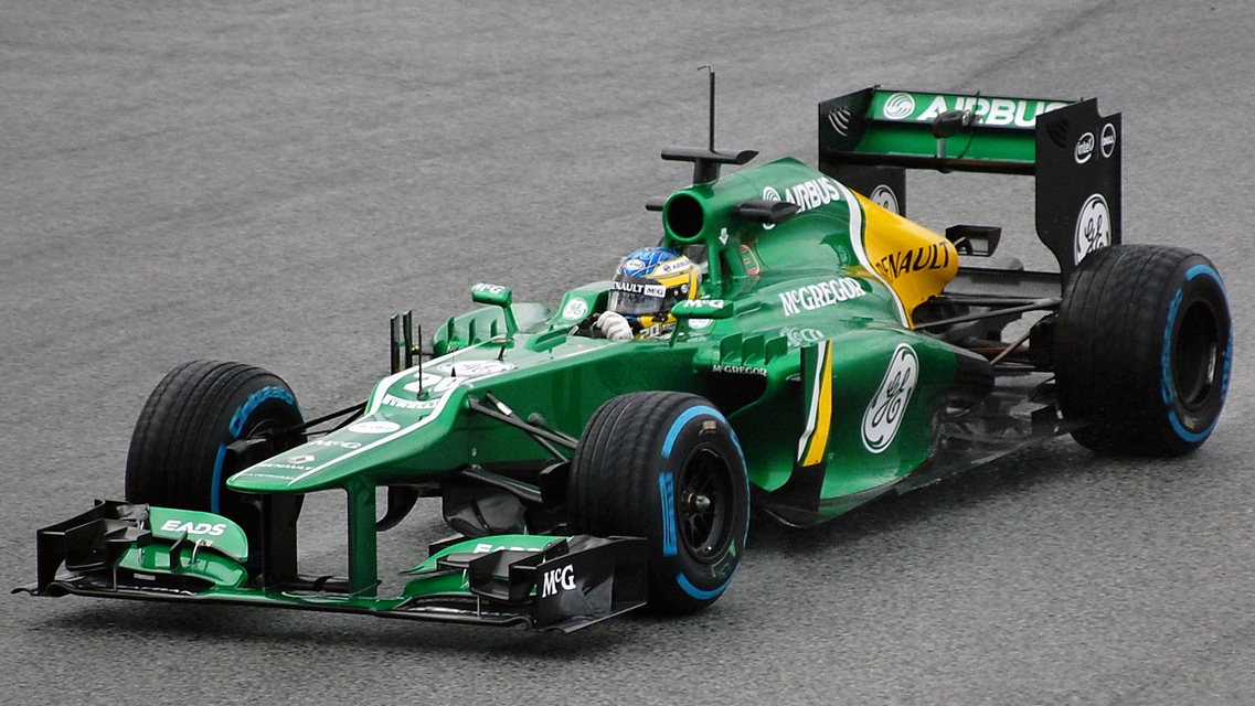 F1 test days 28/02/2013